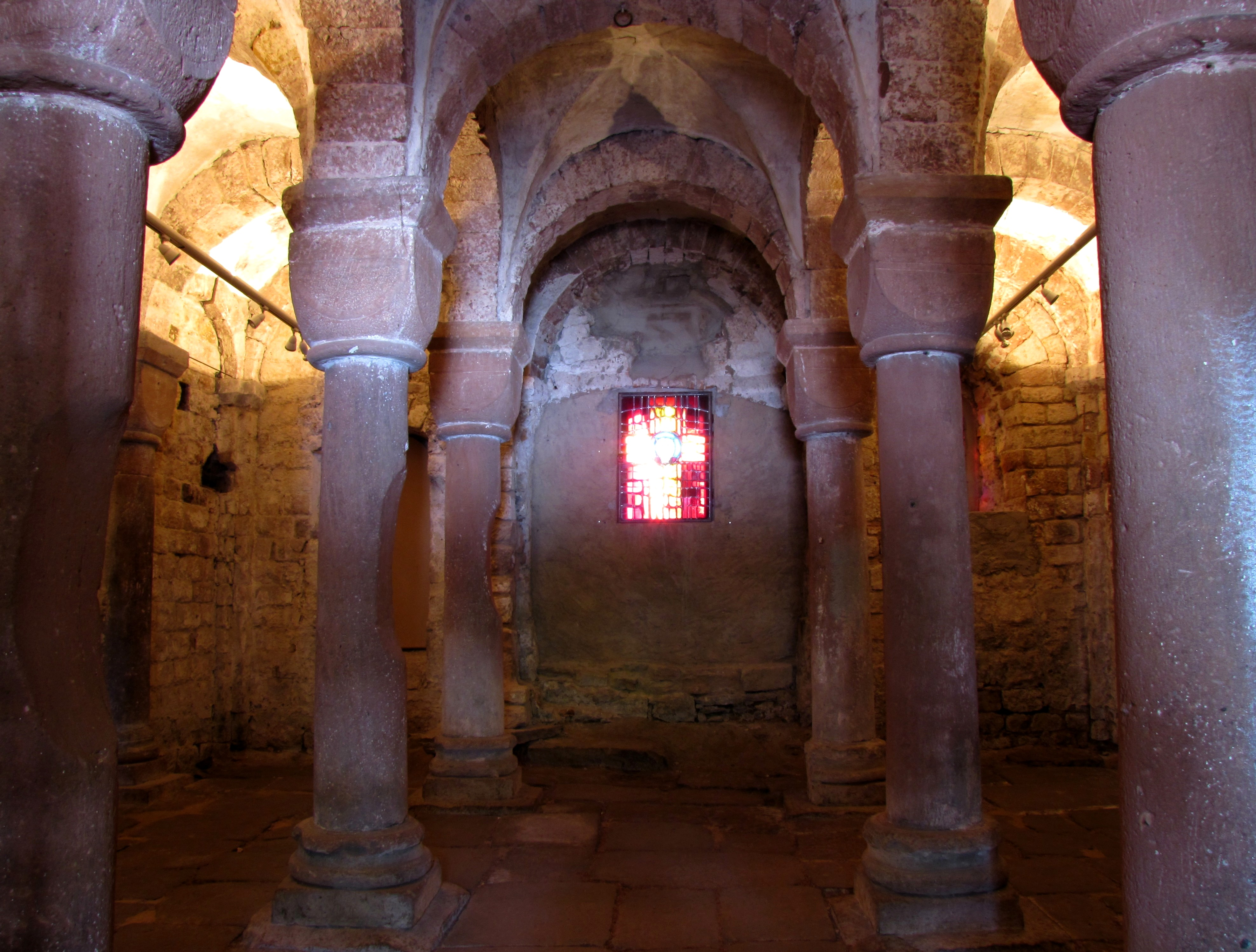 Alsace, Bas-Rhin, Wissembourg, Église abbatiale Saints-Pierre-et-Paul (PA00085247, IA67008036). Chapelle romane Saints-Pierre-et-Paul (XIe) (PA00085243, IA67008039).